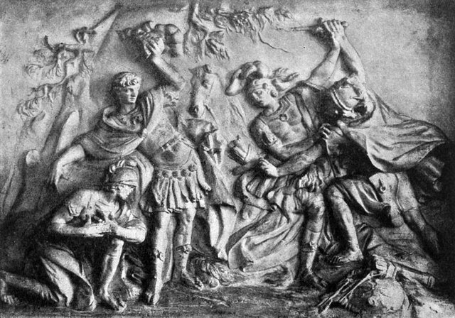 Скульптура М.И.Козловского: Изяслав Мстиславич на поле брани